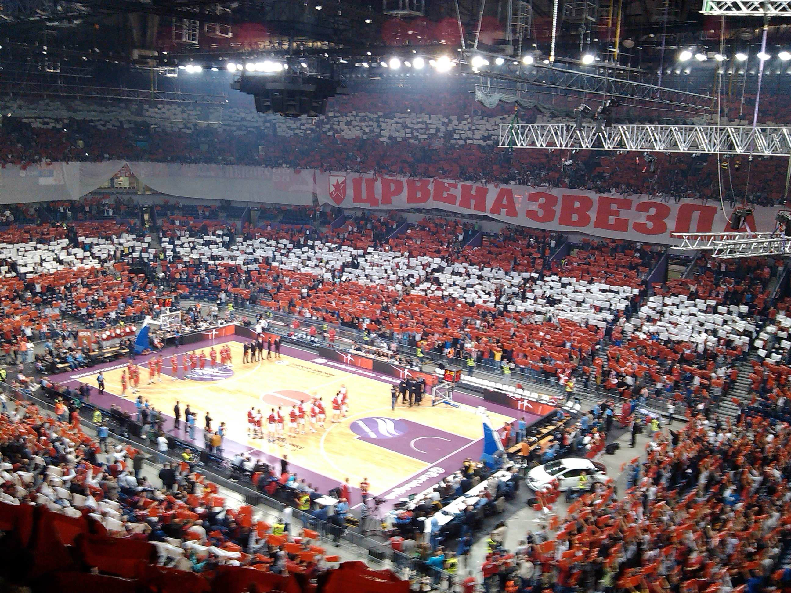 Fanoušci týmu Crvena Zvezda, známí pod názvem Delije